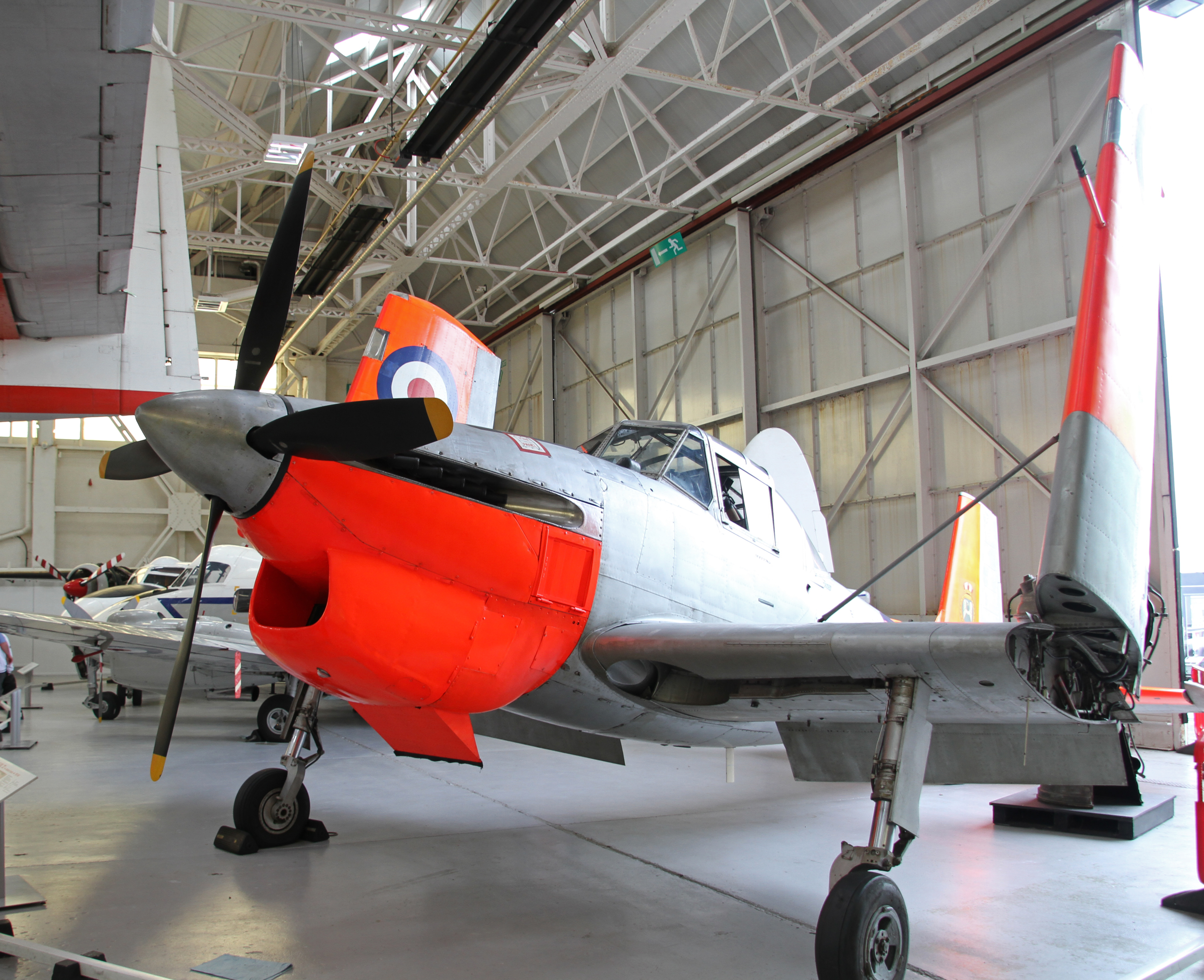 Boulton Paul Sea Balliol T21